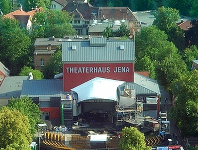 TheaterhausJena